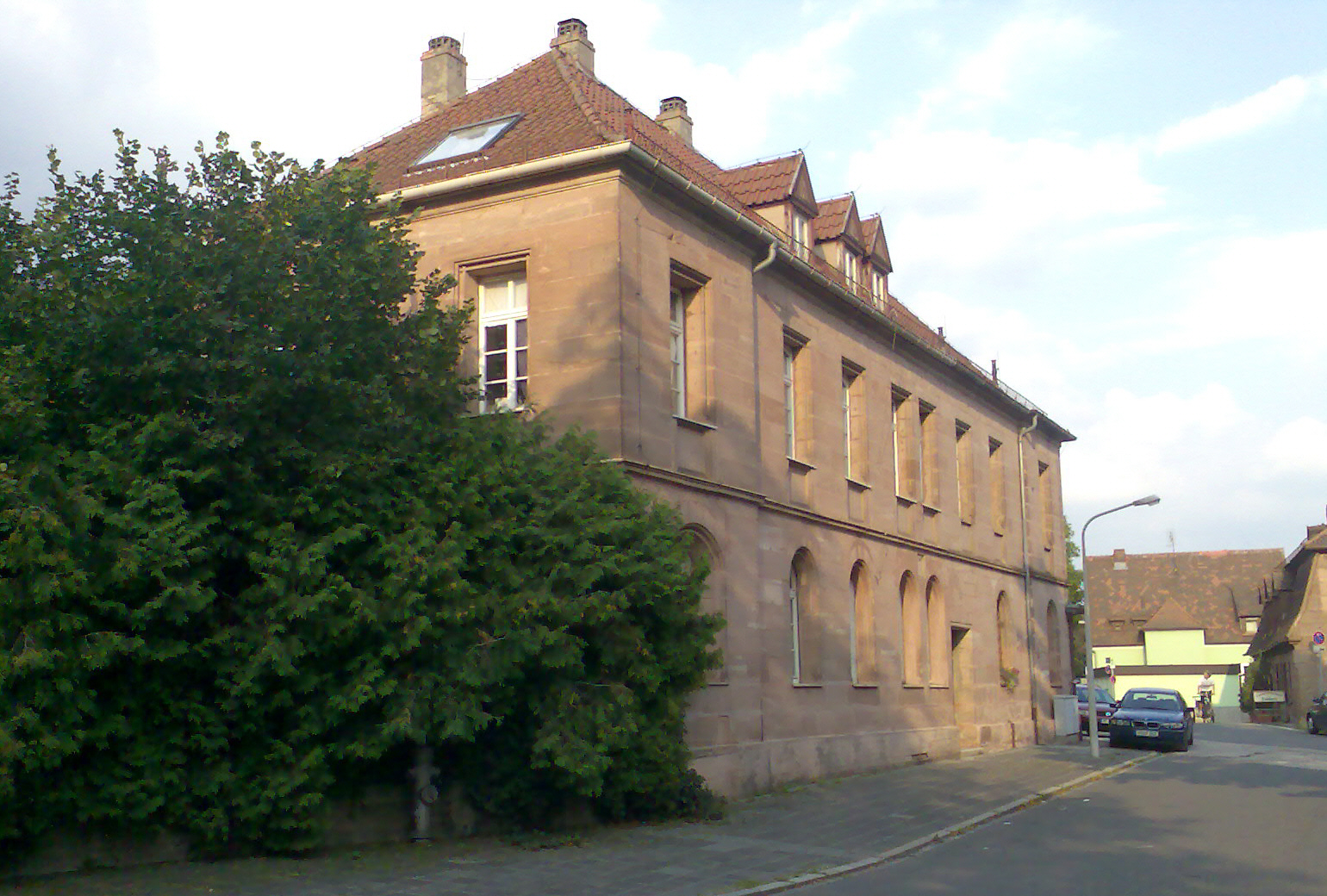 Herrensitz Zerzabelshof (Metthing-Schloss) in Nürnberg Zerzabelshof - Südflügel